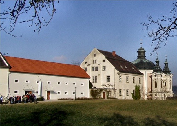 Pfarrheim und Wallfahrtskirche Christkindl